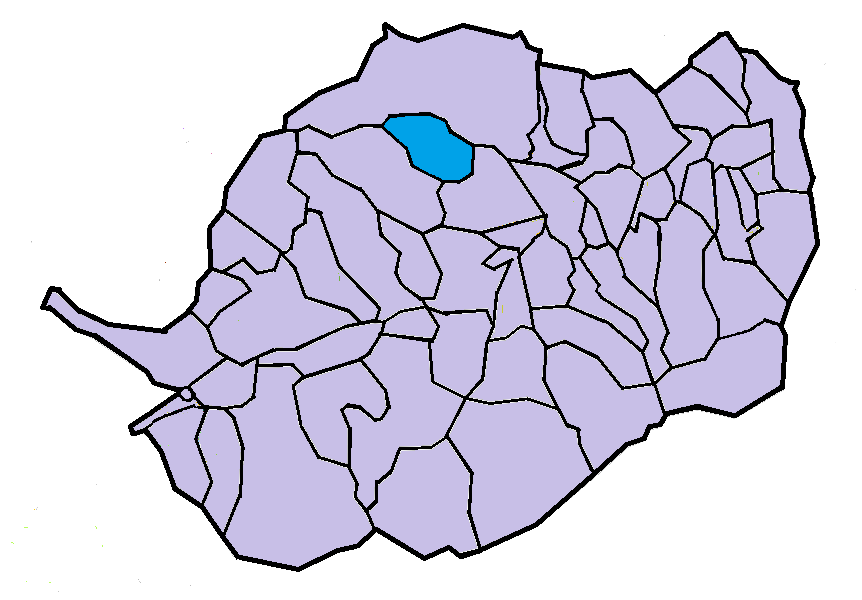 Orbanyà en el Conflent, a partir del mapa municipal del Conflent de lliure disposició adaptat al Nomenclàtor toponímic aprovat el 2007